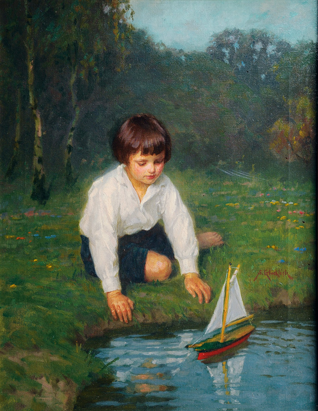 Junge mit Segelboot